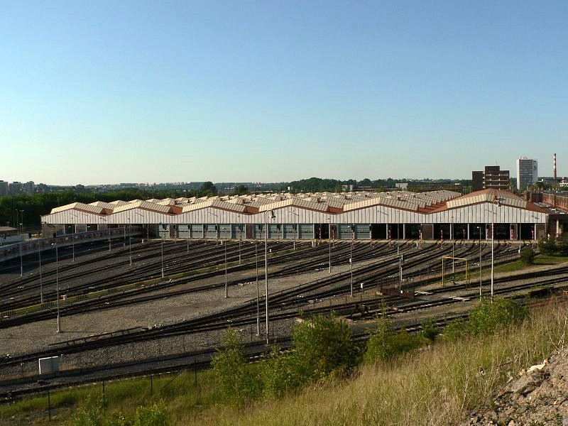 Depo Hostivař, Prague metro